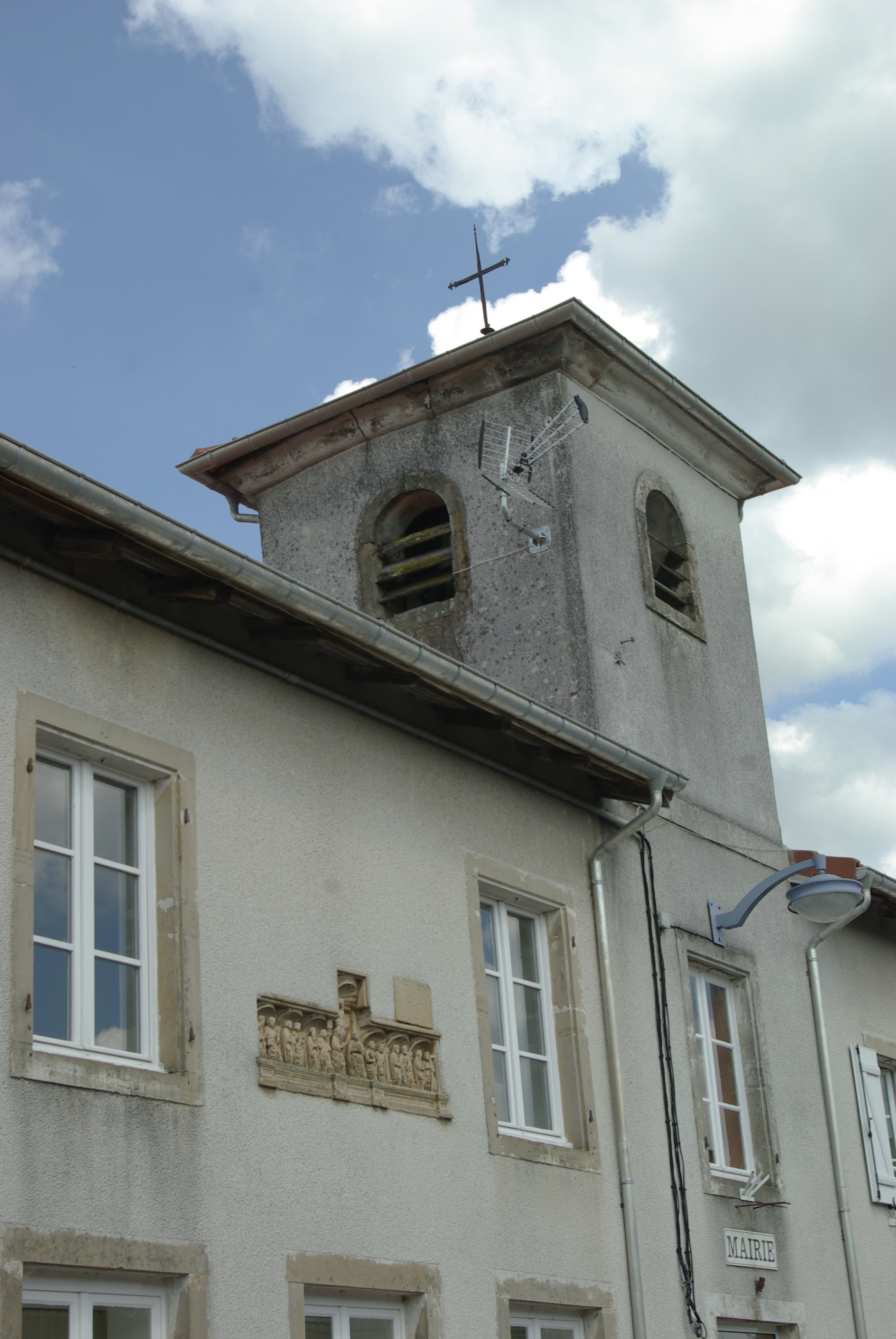 Mairie de Repel (88)